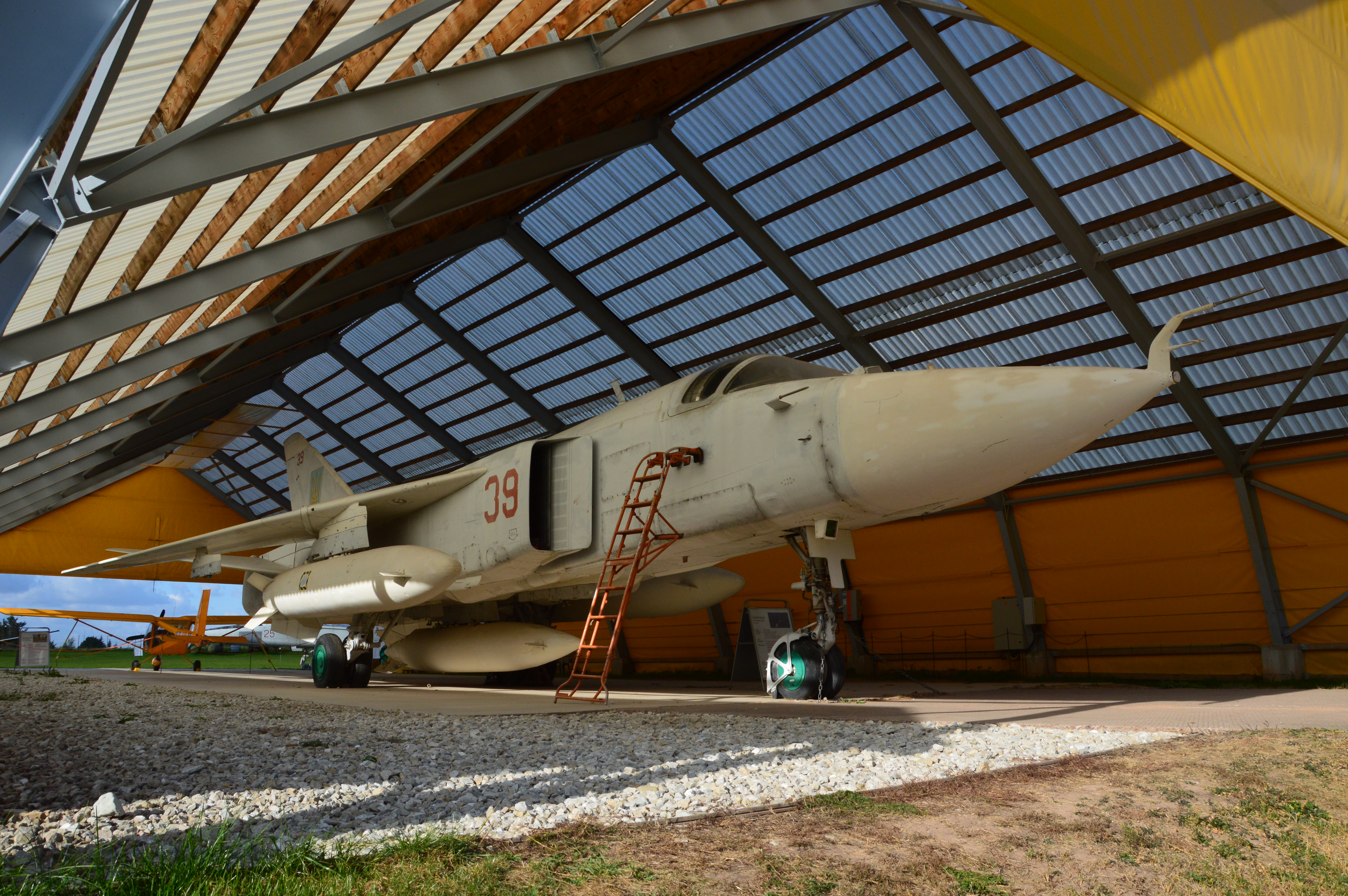 Suhhoi Su-24 Eesti Lennundusmuuseumis.